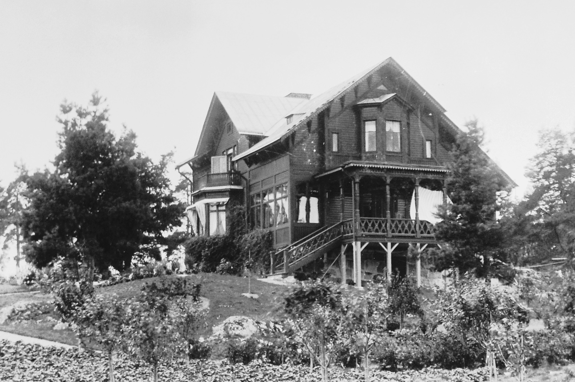 ”Siökronas villa” i kvarteret Gamla Djursholm (numera finns Villa Grimberg på platsen).